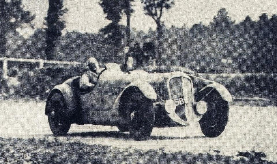 La Delahaye 135CS au Grand Prix de l'ACF 1936.